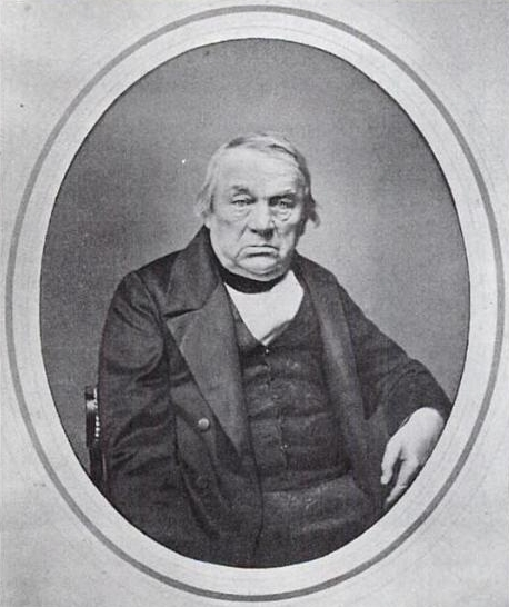 Franz Joseph Fröhlich (1780–1862), Professor der Ästhetik, Pädagogik und Didaktik an der Universität Würzburg, Leiter der Musikhochschule Würzburg. Altersbild aus dem Stadtarchiv Würzburg.